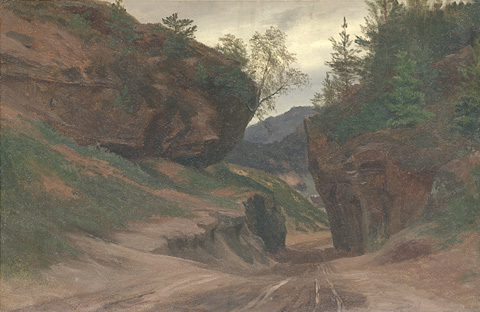 Weg zwischen Felsen ins Tal